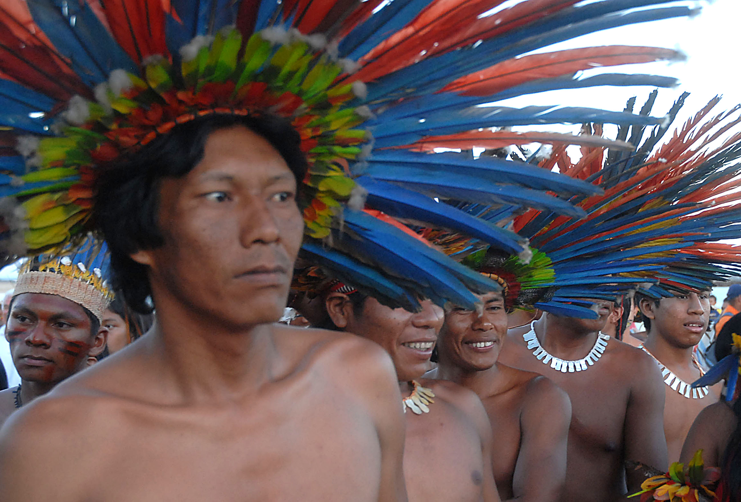 Índios da etnia Bororo-Boe na cerimônia de encerramento da nona edição dos Jogos dos Povos Indígenas (Olinda PE)